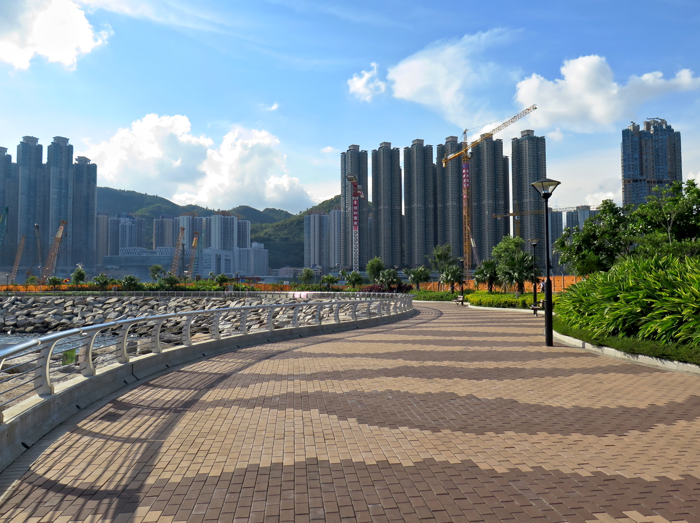 Tseung Kwan O Waterfront Promenade